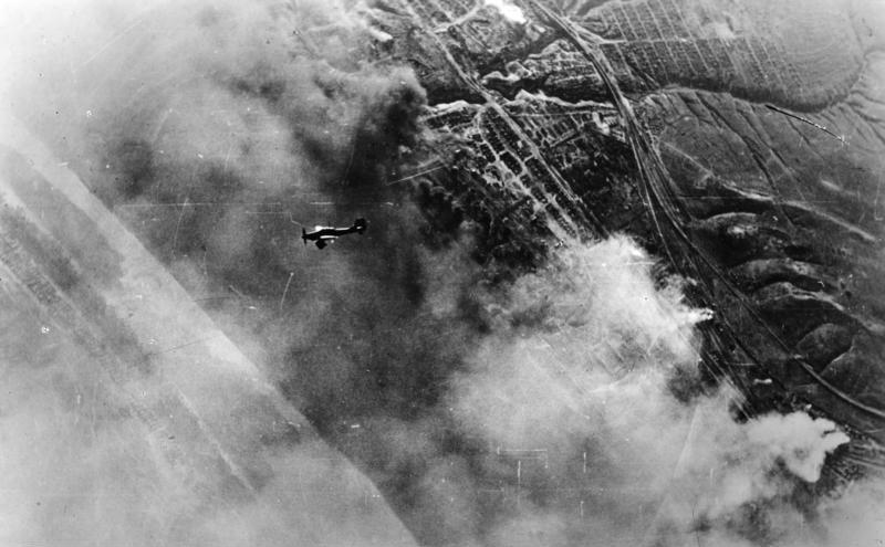 Russland, Kampf um Stalingrad, Luftangriff Scherl: Prop.Kp. 2-Film-Nr.1616 Kl. 126/14 Bildberichter: Sdf. Klose Raum von Stalingrad - 2.10.1942 Serie: Wir stürzen auf Stalingrad. Die Bomben sind geworfen. Das Sturzkampfflugzeug nach dem Abfangen. "Frei" O.K.W. Freigegeben Bildpresse: 19.10.1942 5853/42 ADN-Bildarchiv II. Weltkrieg 1939-45 An der Front in der Sowjetunion; Oktober 1942 Angriff von Sturzkampfflugzeugen "Ju 87" der deutschen Luftwaffe am 2.10.auf Stalingrad - nach dem Bombenabwurf wird der Stuka abgefangen. [Sowjetunion.- Schlacht um Stalingrad]